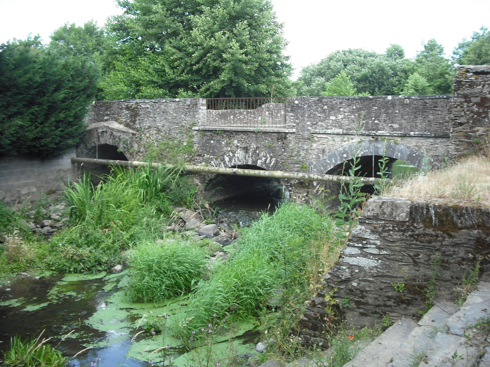 L'Arche-Saint-Denis à Candé, Maine-et-Loire, France.